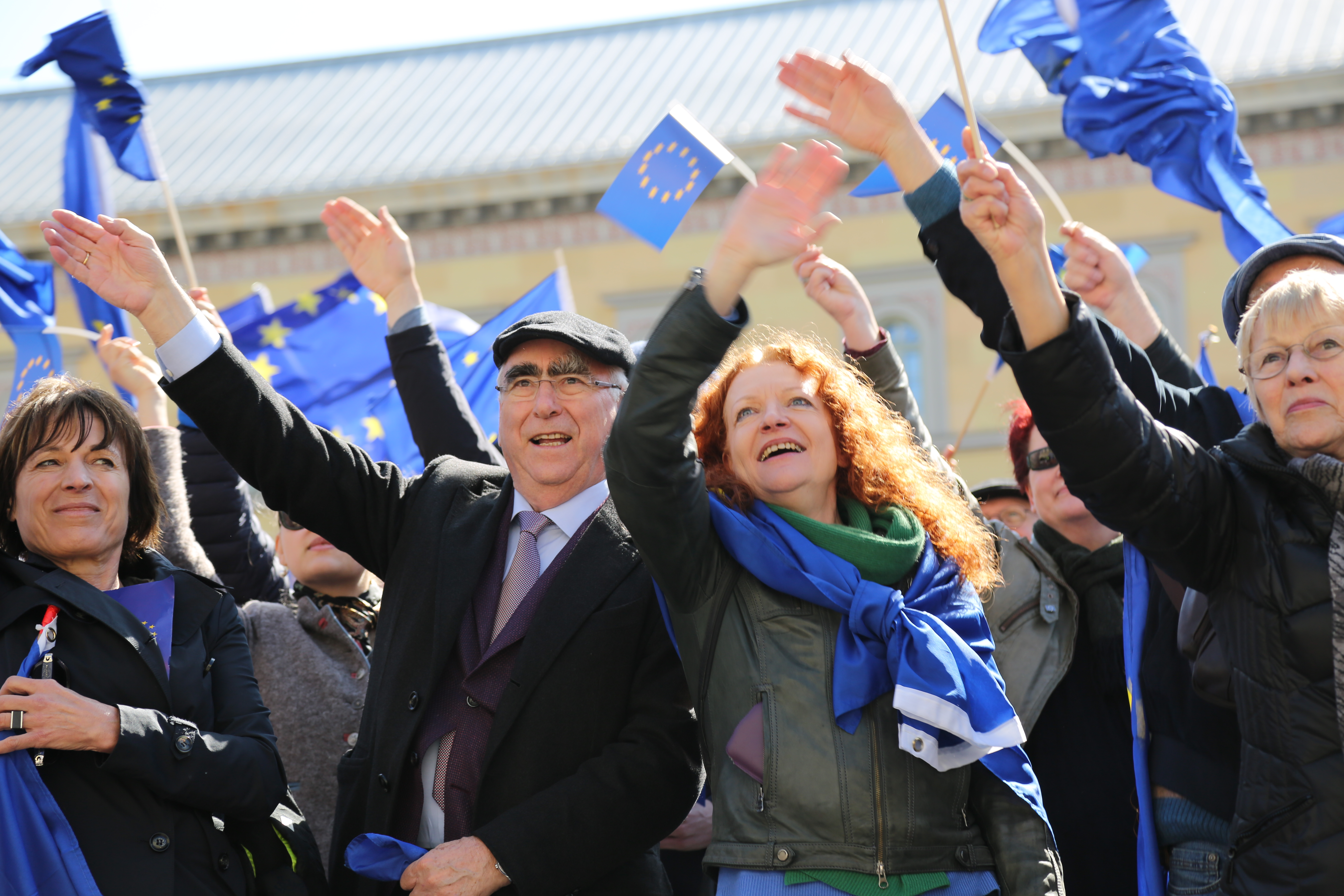 Pulse of Europe, 26. März 2017 auf dem Münchner Max-Josef-Platz, Theo Waigel (CSU) und Margarete Bause (Grüne) unter den Teilnehmern